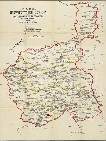 Bitwy Powstania Styczniowego w Królestwie Kongresowym. en. Battles of January Uprising in Congress Poland. - Battle of Grochowiska marked in purple